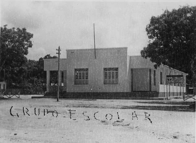 Grupo